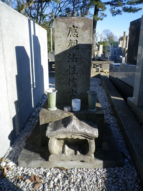 河上彦斎の墓(池上本門寺)